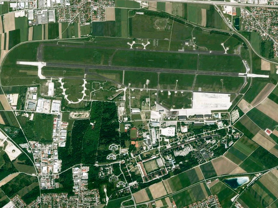 Luftaufnahme der Bayerischen Vermessungsverwaltung: Flugplatz Fürstenfeldbruck in Oberbayern, Bayern.